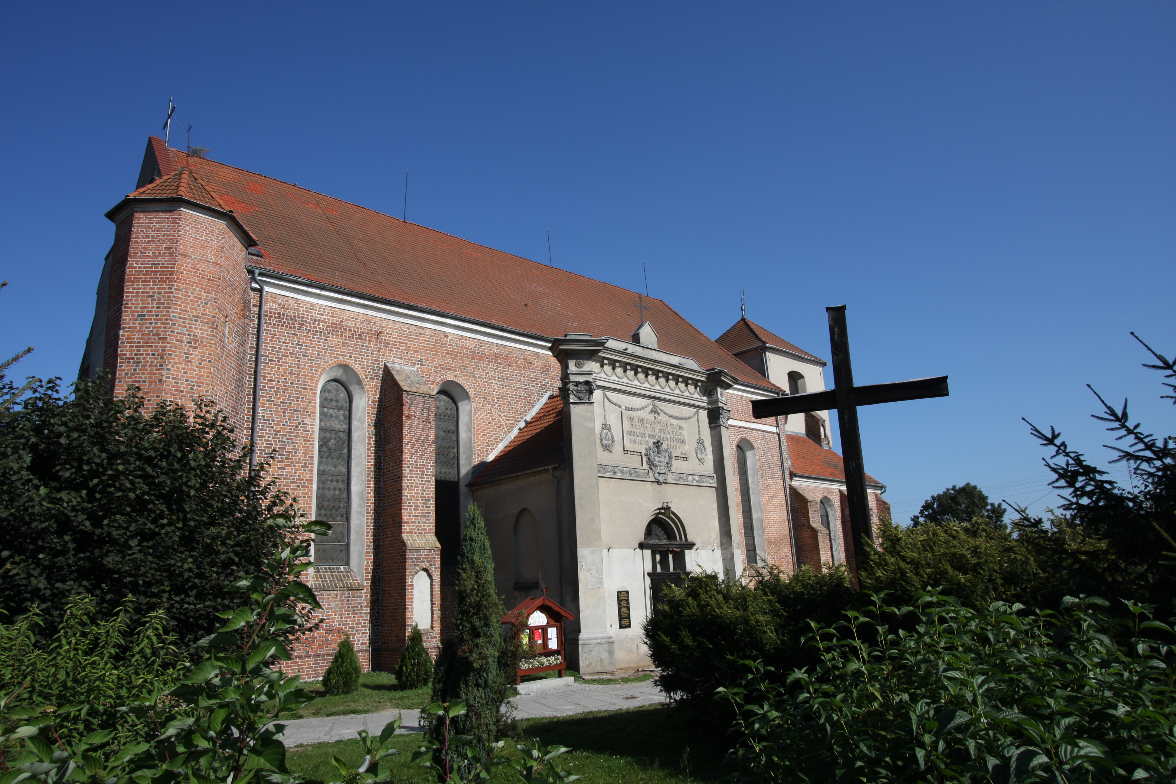 Lwówek, kościół par. p.w. NMP Wniebowziętej, mur., 2 poł. XV, XVI, ul. Pniewska